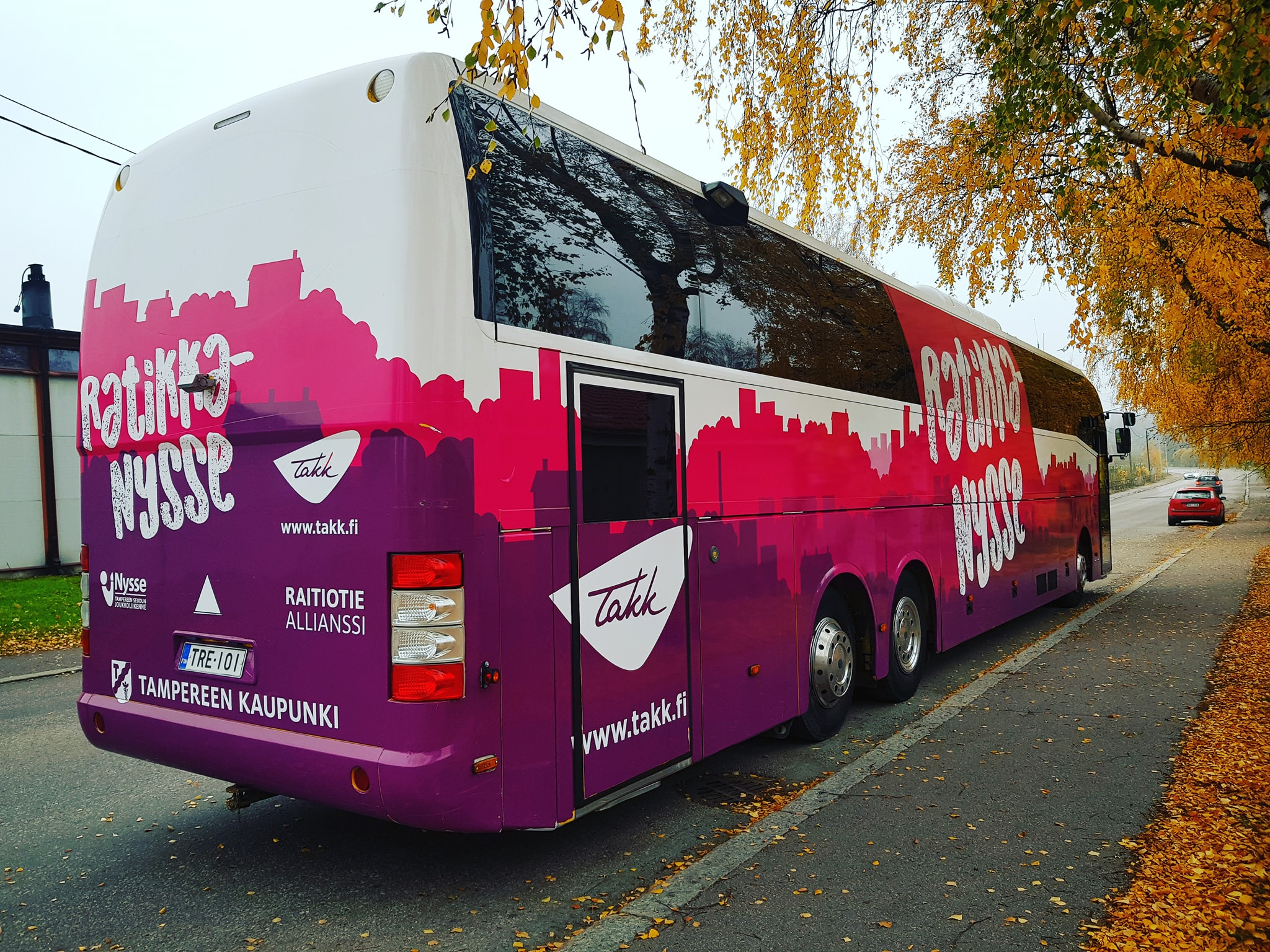 Entinen Netti-Nysse Ratikka-Nyssen väreissä.